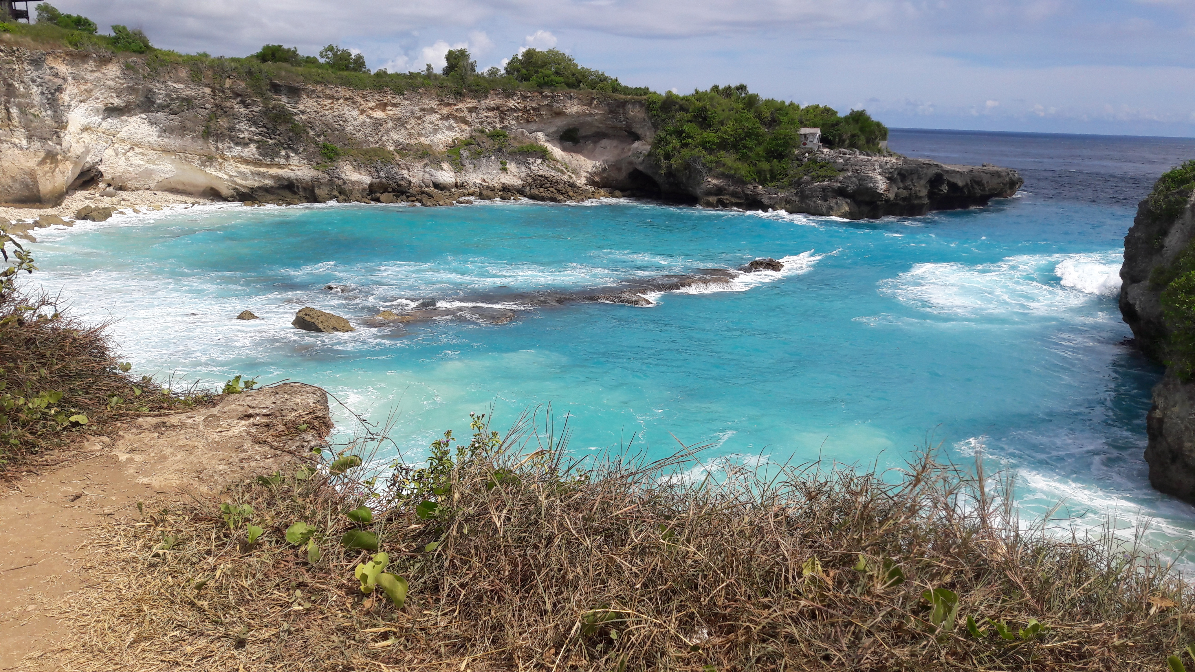 Lokasi yang indah dan cukup tersembunyi di salah satu pulau kecil di wilayah provinsi Bali yang memiliki keindahan layaknya surga tersembunyi yang sangat disarankan untuk para traveller dan diharapkan mampu untuk tetap dilestarikan dan dijaga keindahannya